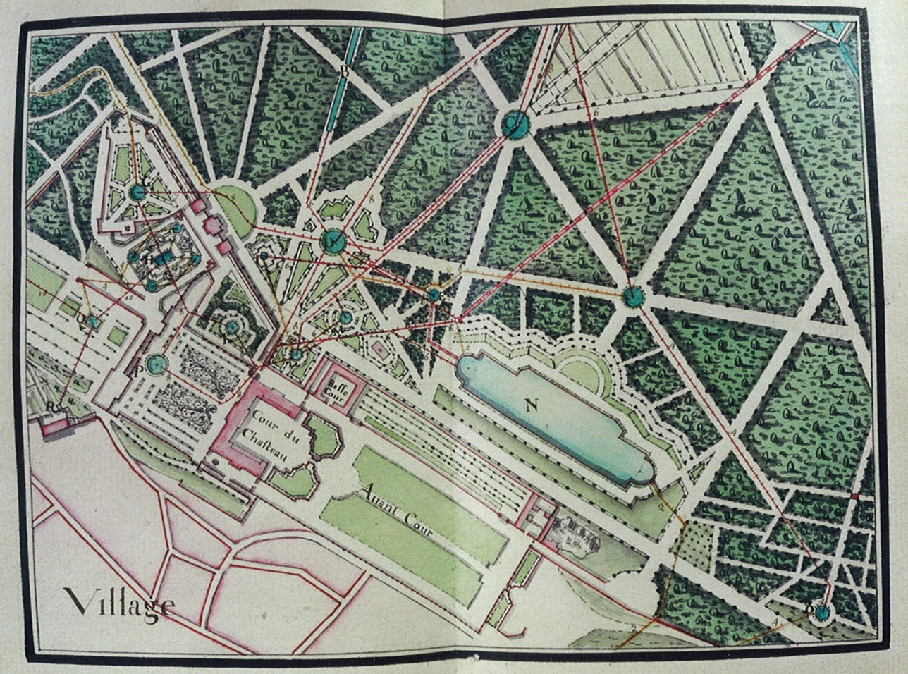 Traité des Eaux de Meudon, 1699, par Nyon.